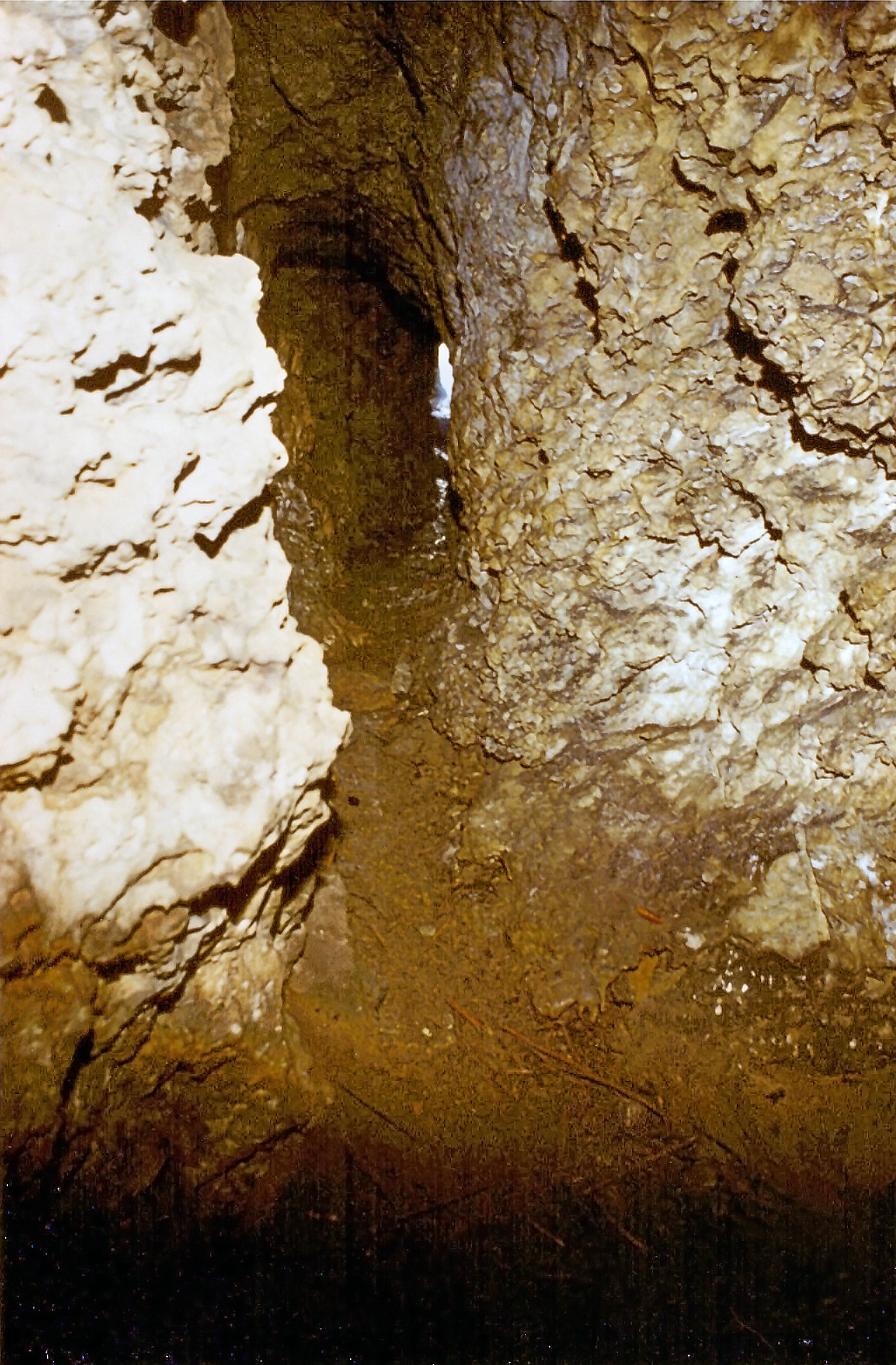 Sommerlager des bayerischen DPSG-Pfadfinderstammes Ägypten-Straßlach im Großraum westlich von Waischenfeld in der Fränkischen Schweiz, 31.08. bis 12.09.1986. Im Bild: Blick zum Ausstieg aus der zwischen Waischenfeld und Zeubach gelegenen Försterhöhle. Diese 92 Meter langen Höhle im fränkischen Dolomitstein ist durch einen 18 Meter langen Stollen zugänglich. Eine Türe zum Verschließen der Höhle gab es damals noch nicht. Die Höhle lag nahe zu unserem Lagerplatz.